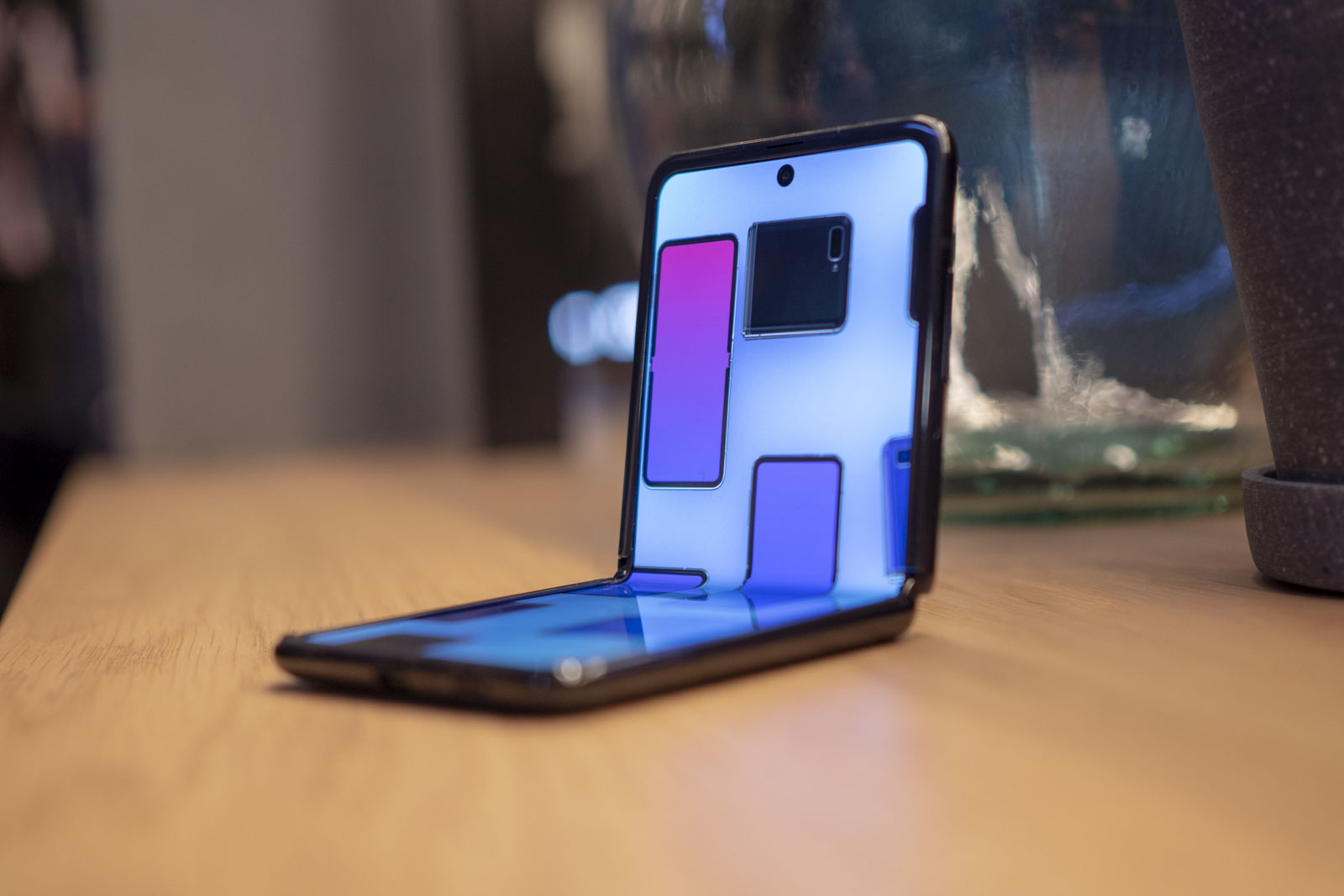 Samsung Galaxy Z Flip